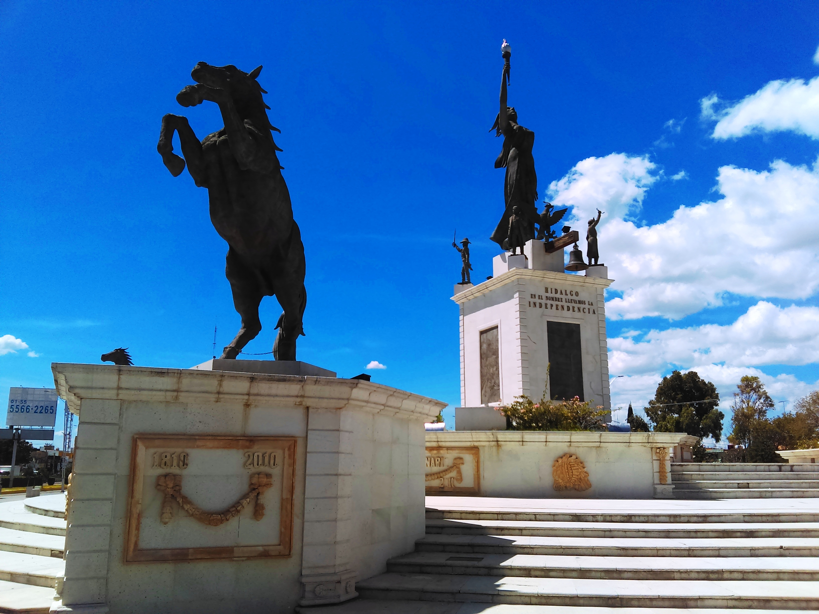 Monumento la Victoria del Viento. 031.jpg